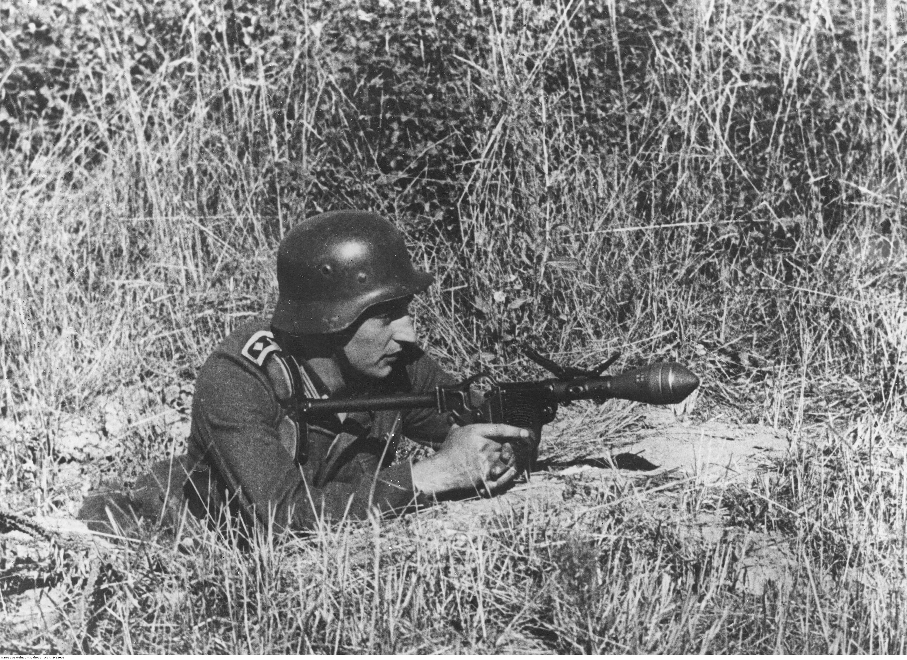 Żołnierz Wehrmachtu z granatnikiem Sturmpistole (wersja pistoletu sygnałowego Leuchtpistole LeuP 42) z załadowanym przeciwpancernym granatem nasadkowym Panzerwurfkörper 42 LP.